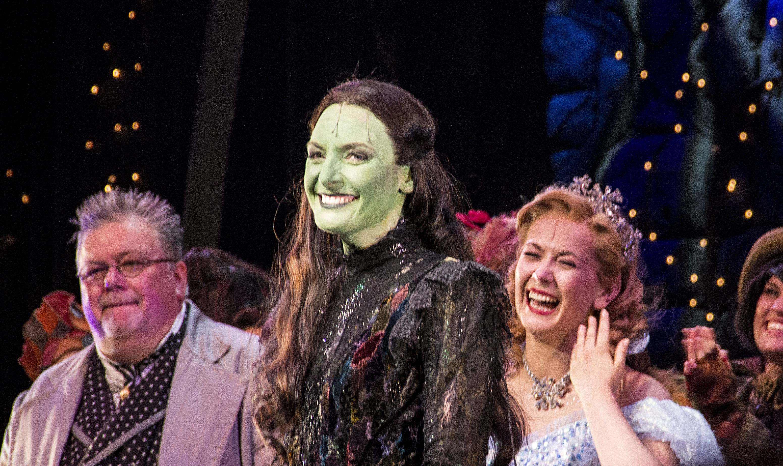 Willemijn haar laatste show als Elphaba (Wicked UK).